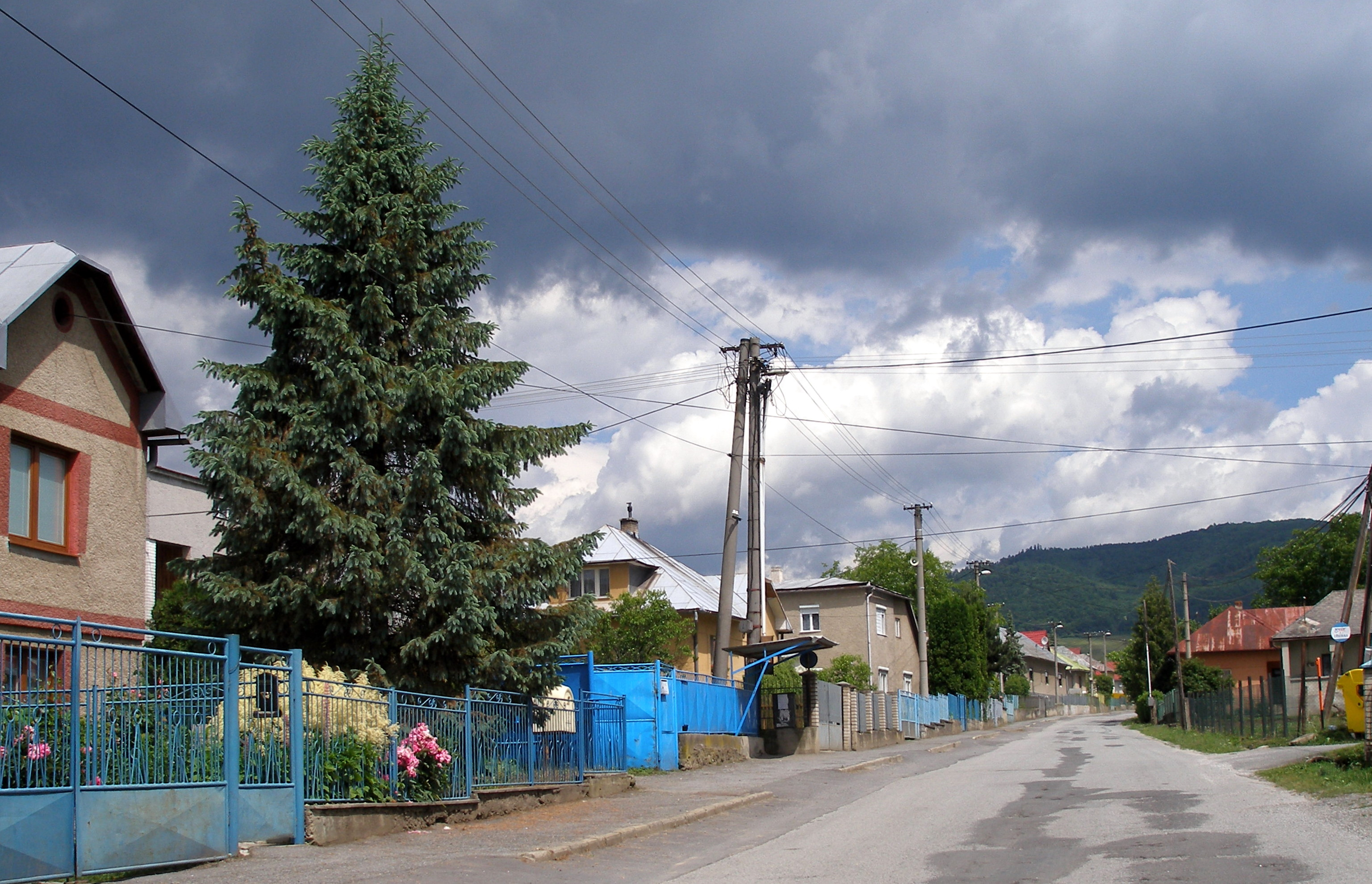 Obec Jakubovany okres Sabinov.